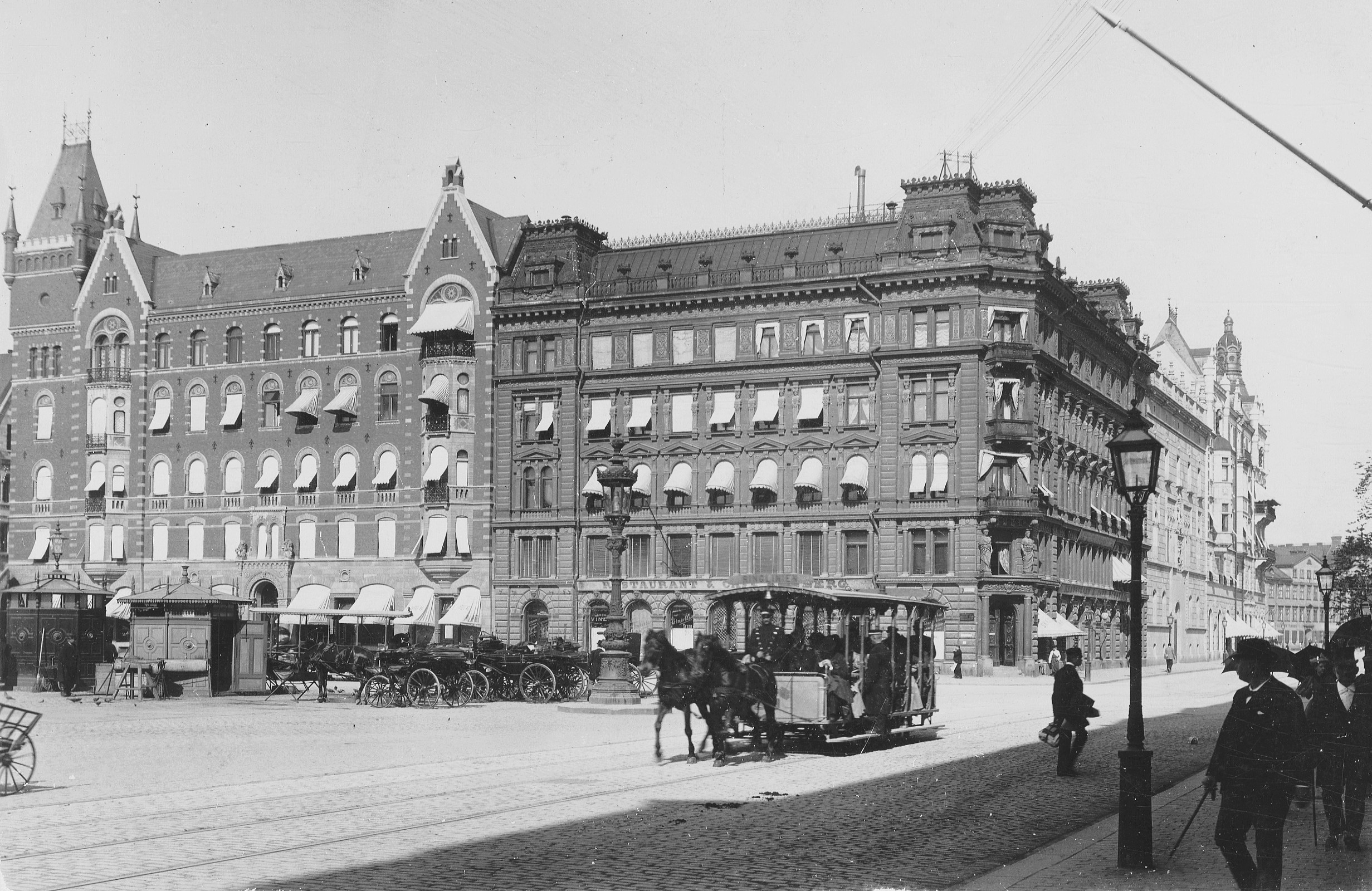 Norrmalmstorg 2 och 4 (Skravelberget mindre 9 respektive 7) med Restautang Rösberg i bottenvåningen